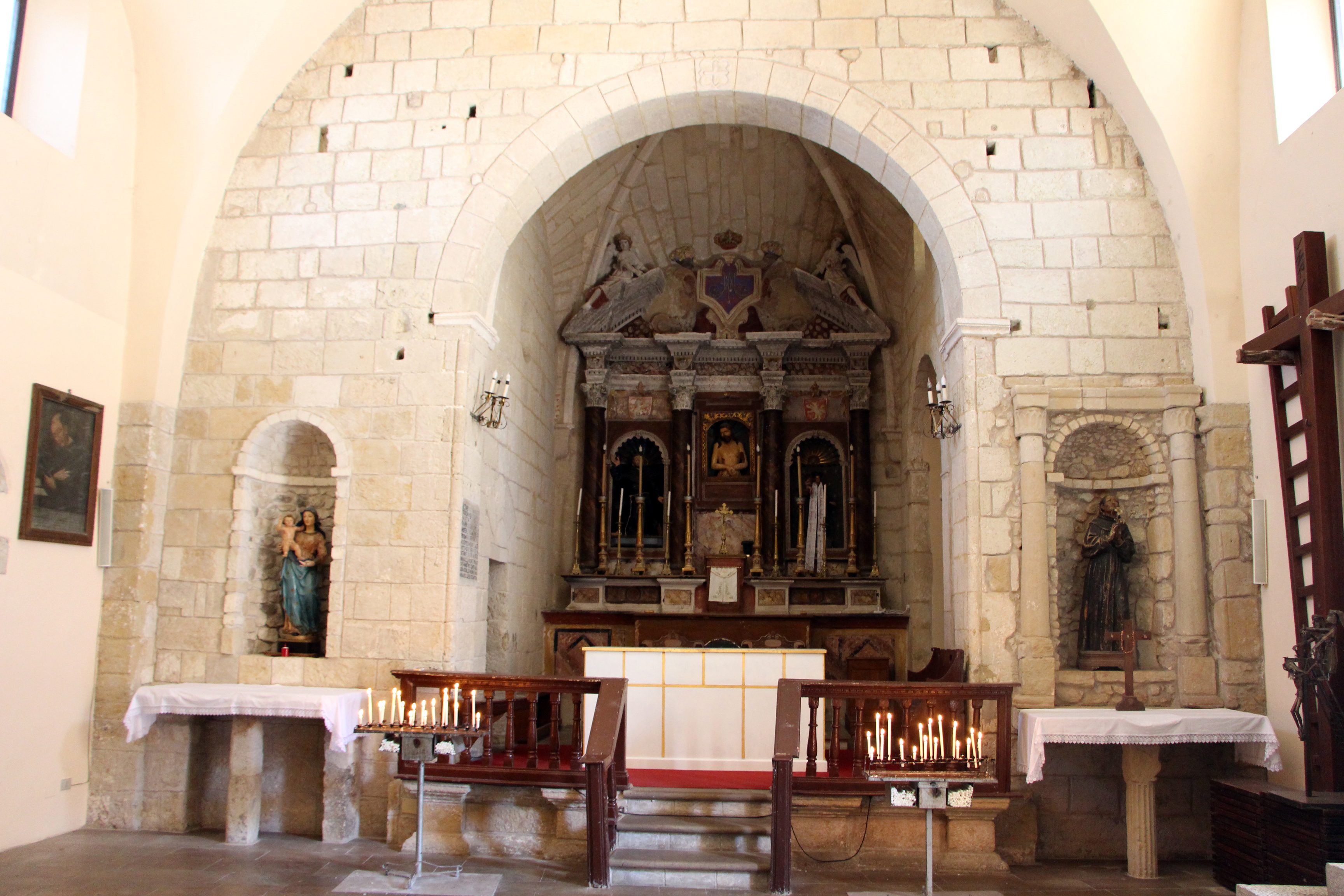 Castelsardo